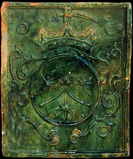 Кафля з выявай герба Ордэна кармелітаў босых. Old Belarusian History Museum Native nameМузей старажытнабеларускай культурыLocationMinsk, BelarusCoordinates53° 55′ 00.31″ N, 27° 36′ 11.96″ E Established1977Web page control : Q6511262 VIAF: 152488207 ISNI: 0000 0001 0791 3038 LCCN: n83237058 WorldCat institution QS:P195,Q6511262